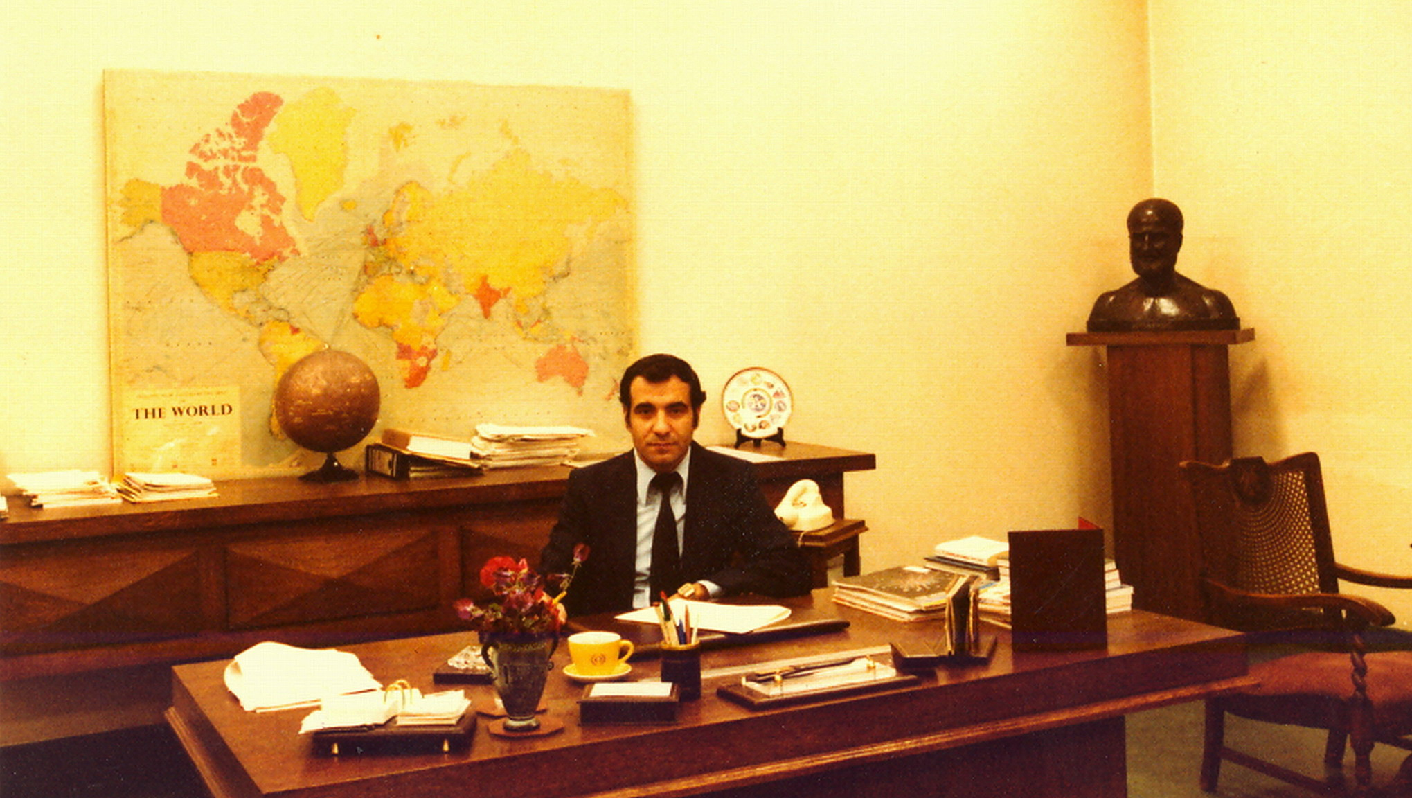 Dionysios P. Simopoulos, Eugenides Planetarium Director, 1975